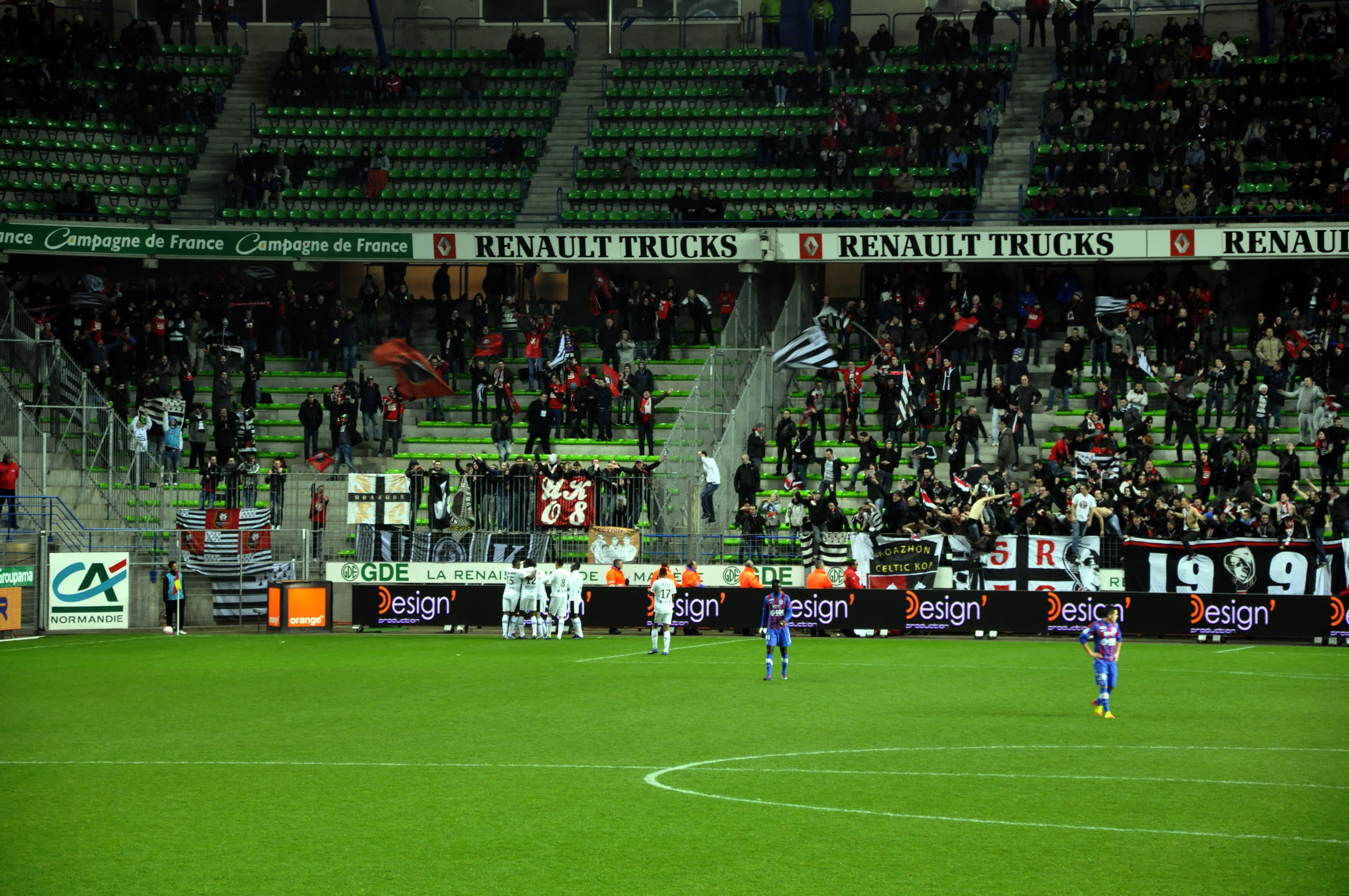 But de Jires Kembo-Ekoko lors du match Caen Rennes comptant pour la Template:20e journée de championnat de Ligue 1 2011-2012